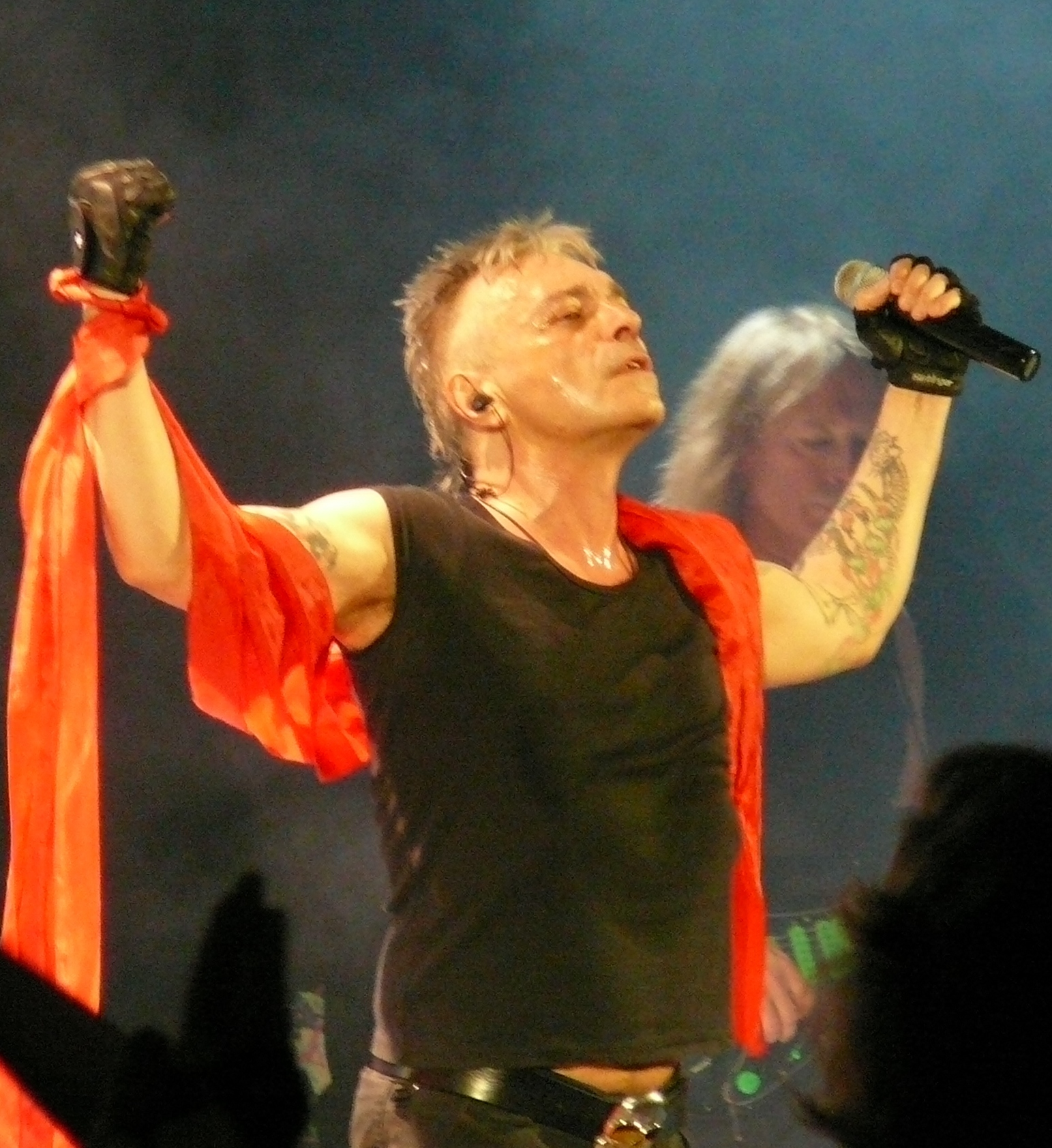 Константин Евгеньевич Кинчев - солист группы "Алиса" (концерт в Казани, в КСК "УНИКС", 2 мая 2010 года)